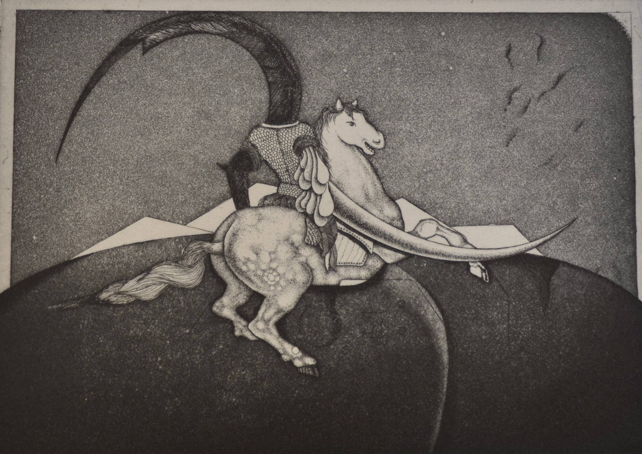 Ebrahim Ehrari, Der Jäger, 1974, Radierung (Aquatinta), 5/25, 30x40cm